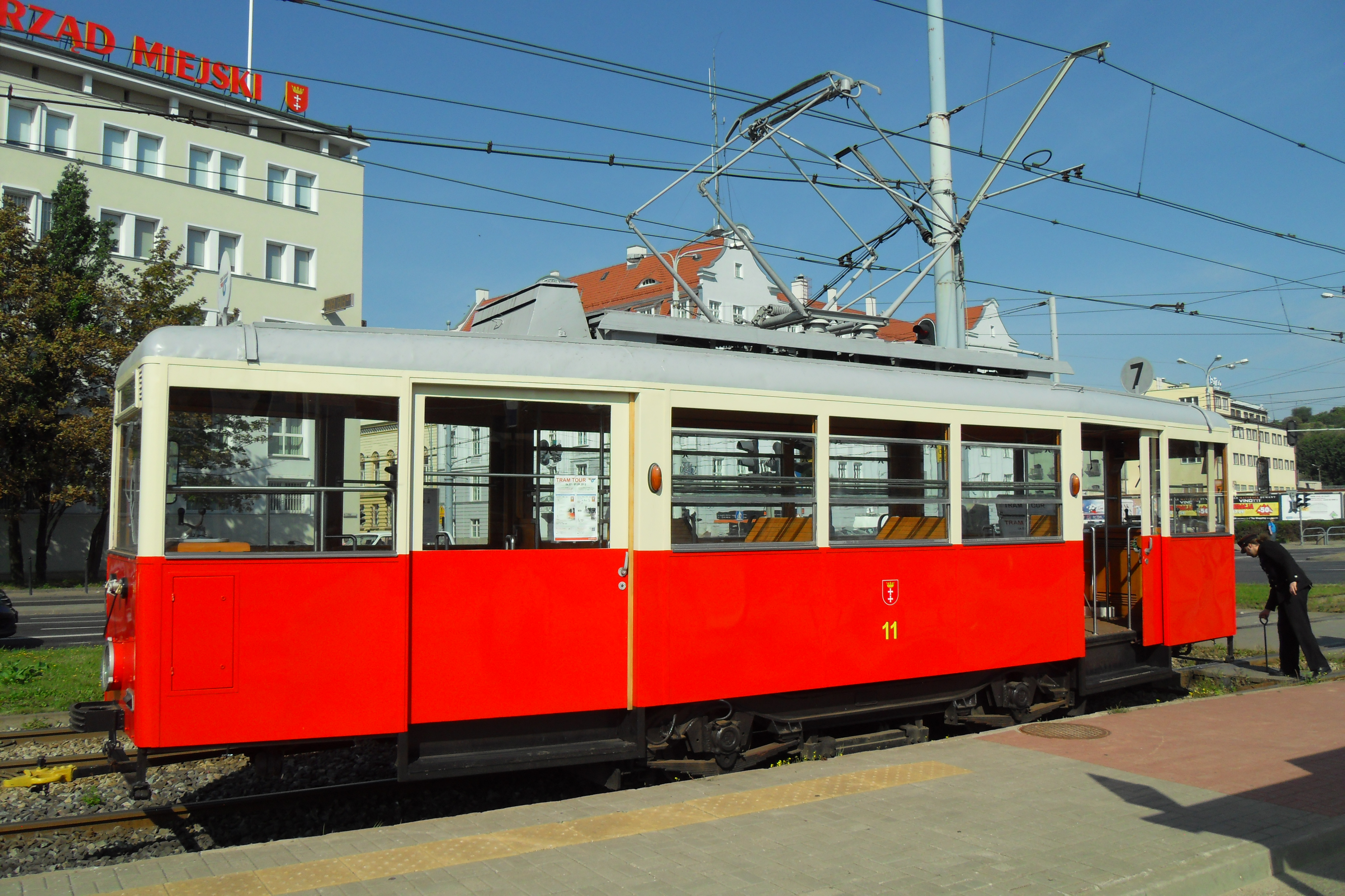 Gdańsk Śródmieście, ul. 3 Maja i Konstal N.